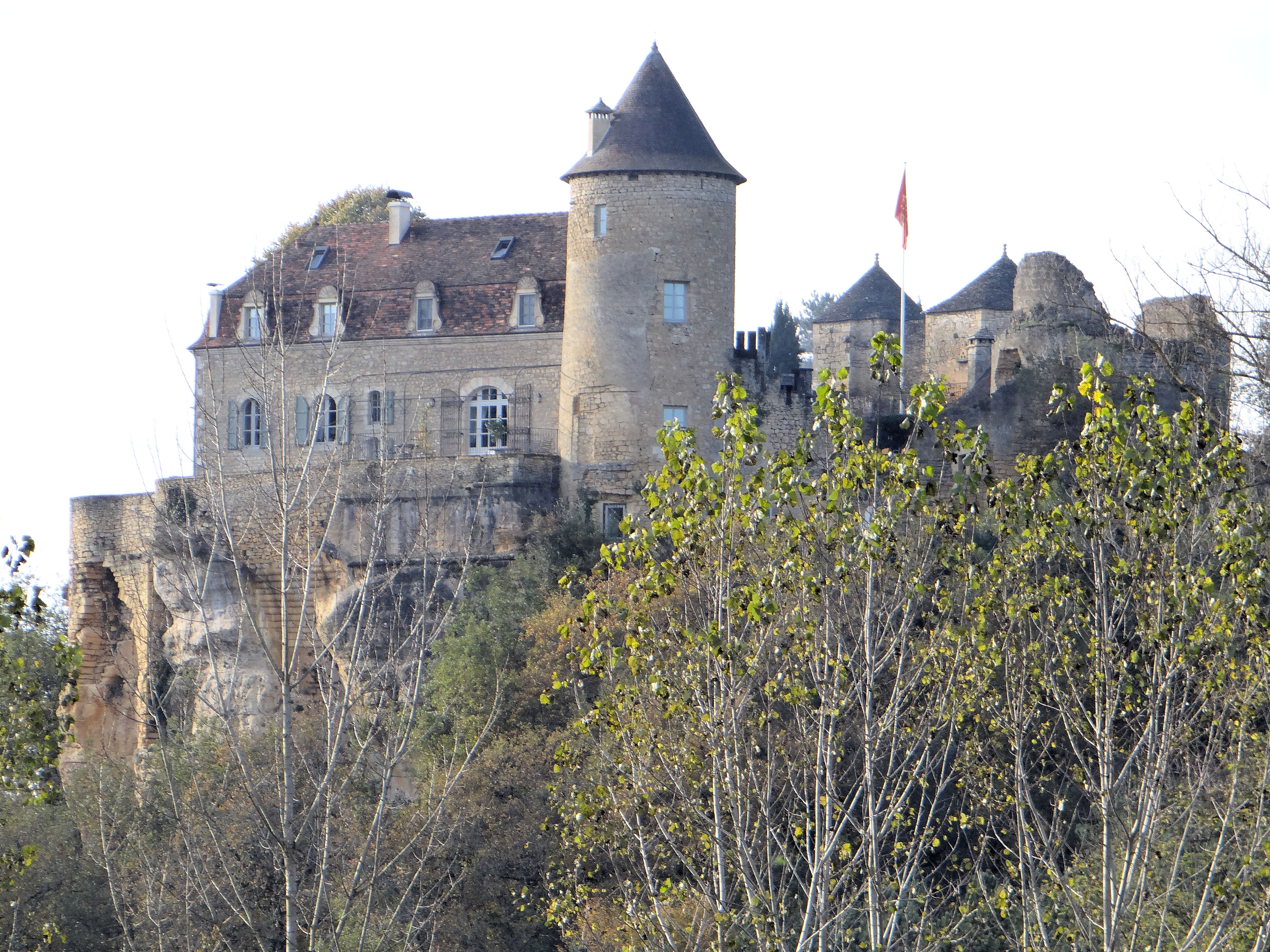 Château de Milhac